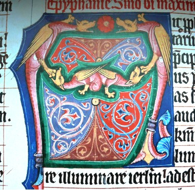 Lektionarium Arnolds von Meissen